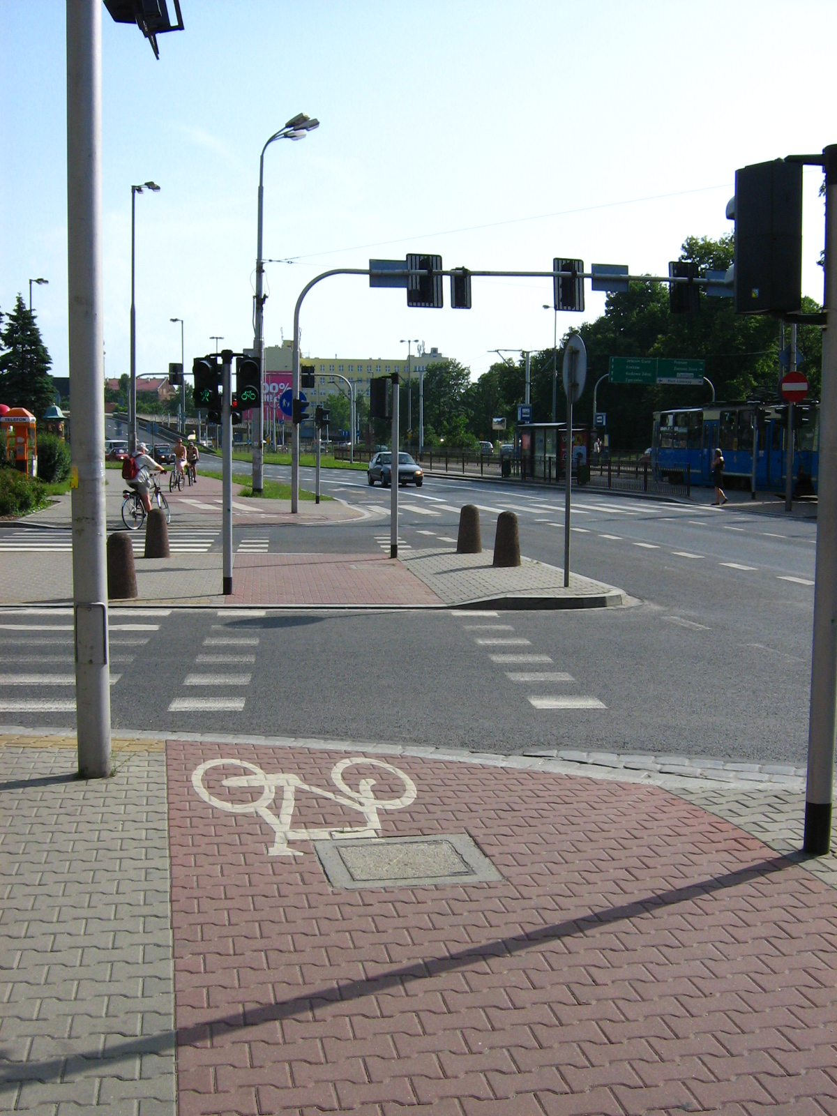 Crossroads - bicycle path - Wrocław, Poland